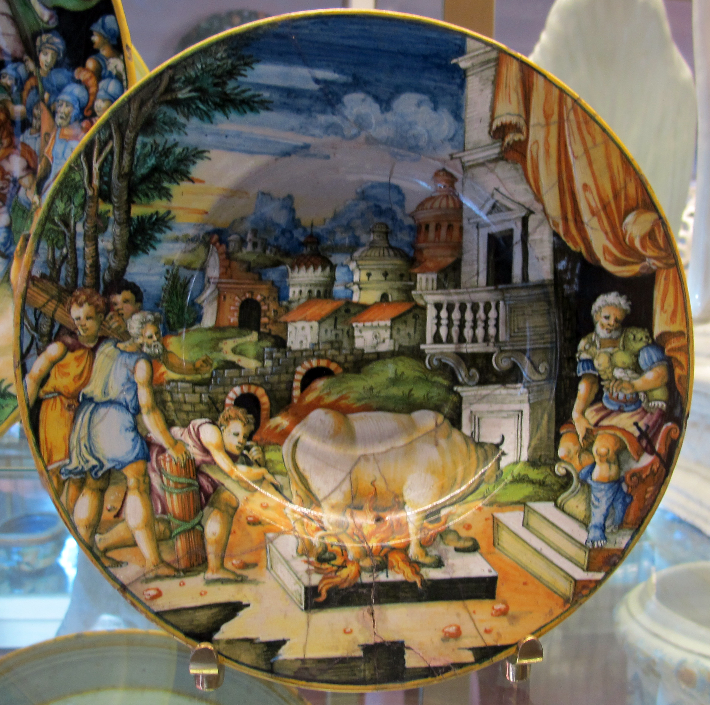 Pesaro (forse), piatto con toro di perillo e falaride, 1550 ca.